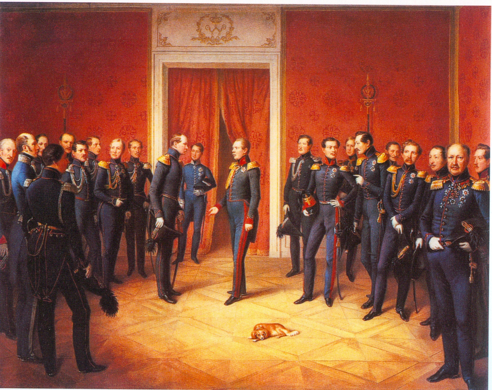 Teilnehmer: von links: Graf Lippe, Oberstallmeister von Taubenheim, von Massenbach, Fürst von Hohenlohe-Öhringen, Graf Waldburg-Zeil, von Rüpplin, Graf Degenfeld, von Spitzenberg, von Ellrichshausen, Prinz Friedrich, Hofmarschall von Seckendorf, König Wilhelm, von Berlichingen, Kronprinz Karl, Prinz Hermann von Sachsen-Weimar, Graf Wilhelm von Württemberg, von Reischach, Graf Neipperg, von Valois, Graf Lippe, von Weißenstein